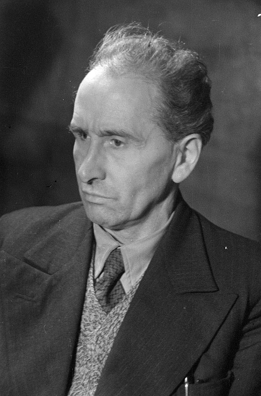 Original image description from the Deutsche Fotothek Porträts: H. Köhnen Bernard Koenen, Olga Körner, Eva Höhn, Gertrud Graeser (Rast), Walter Fisch, Maria Rentmeister